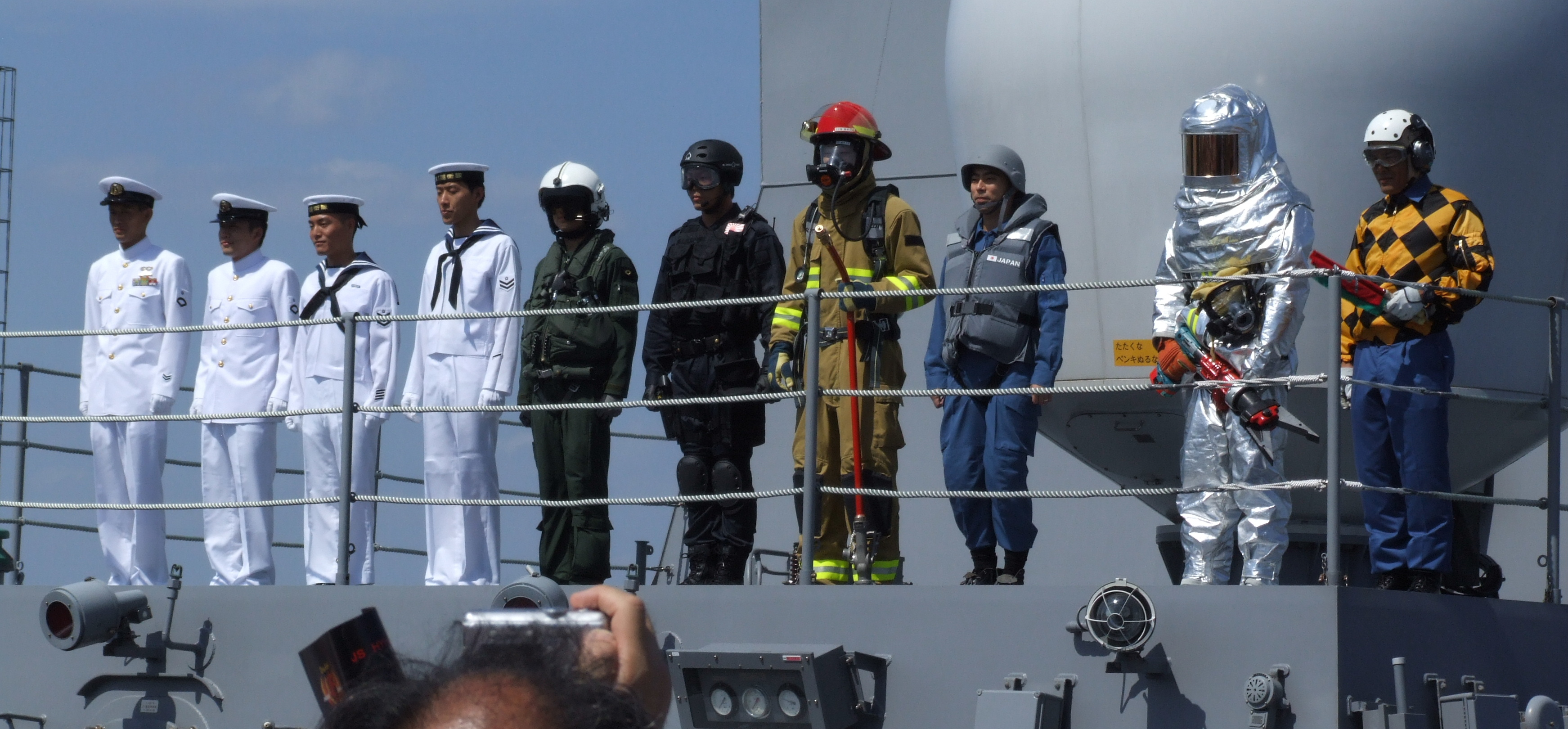 海上自衛隊の制服と作業服。開国博Y150における護衛艦ひゅうがの一般公開にて撮影。 Fujifilm FinePix S9000